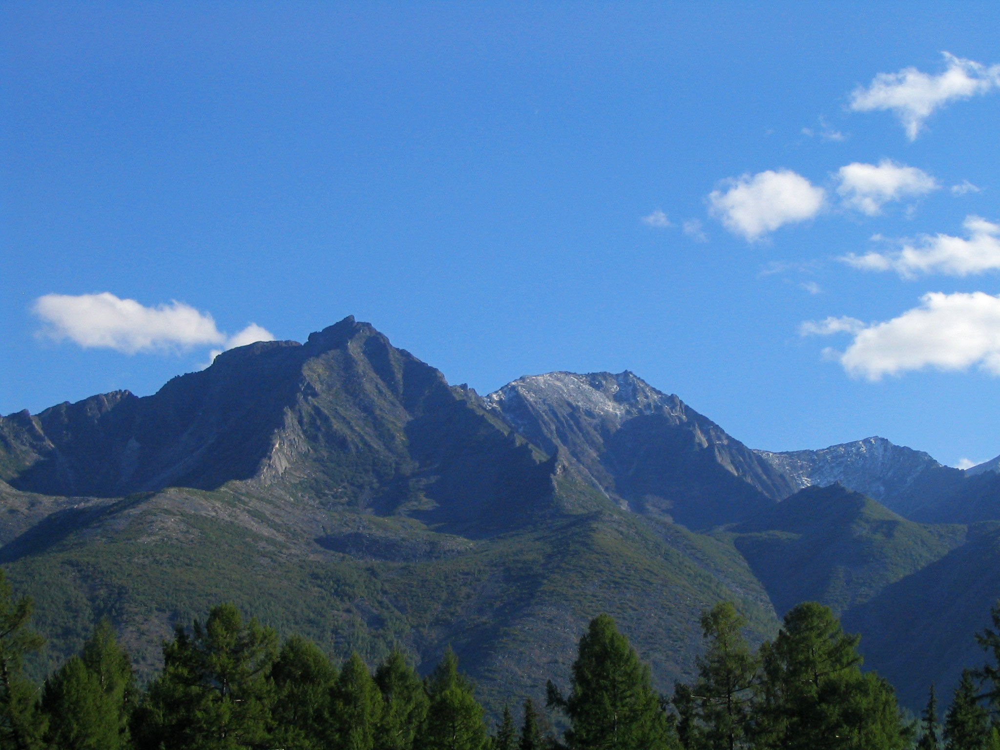 Северо-Муйский хребет. Вид с БАМа.